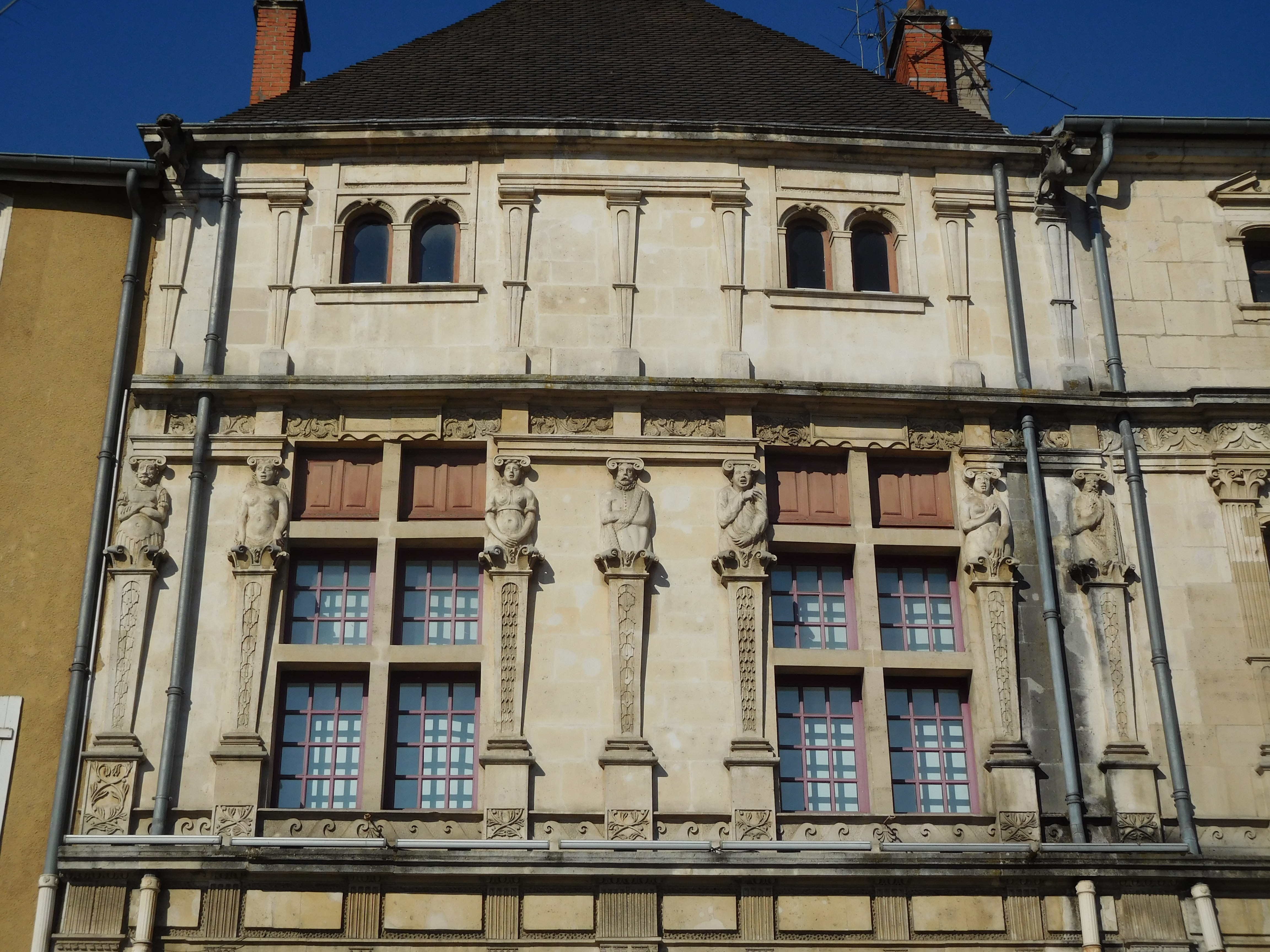 Une maison à Pont-à-Mousson (France) avec illustrations des sept péchées capitaux sur la façade.